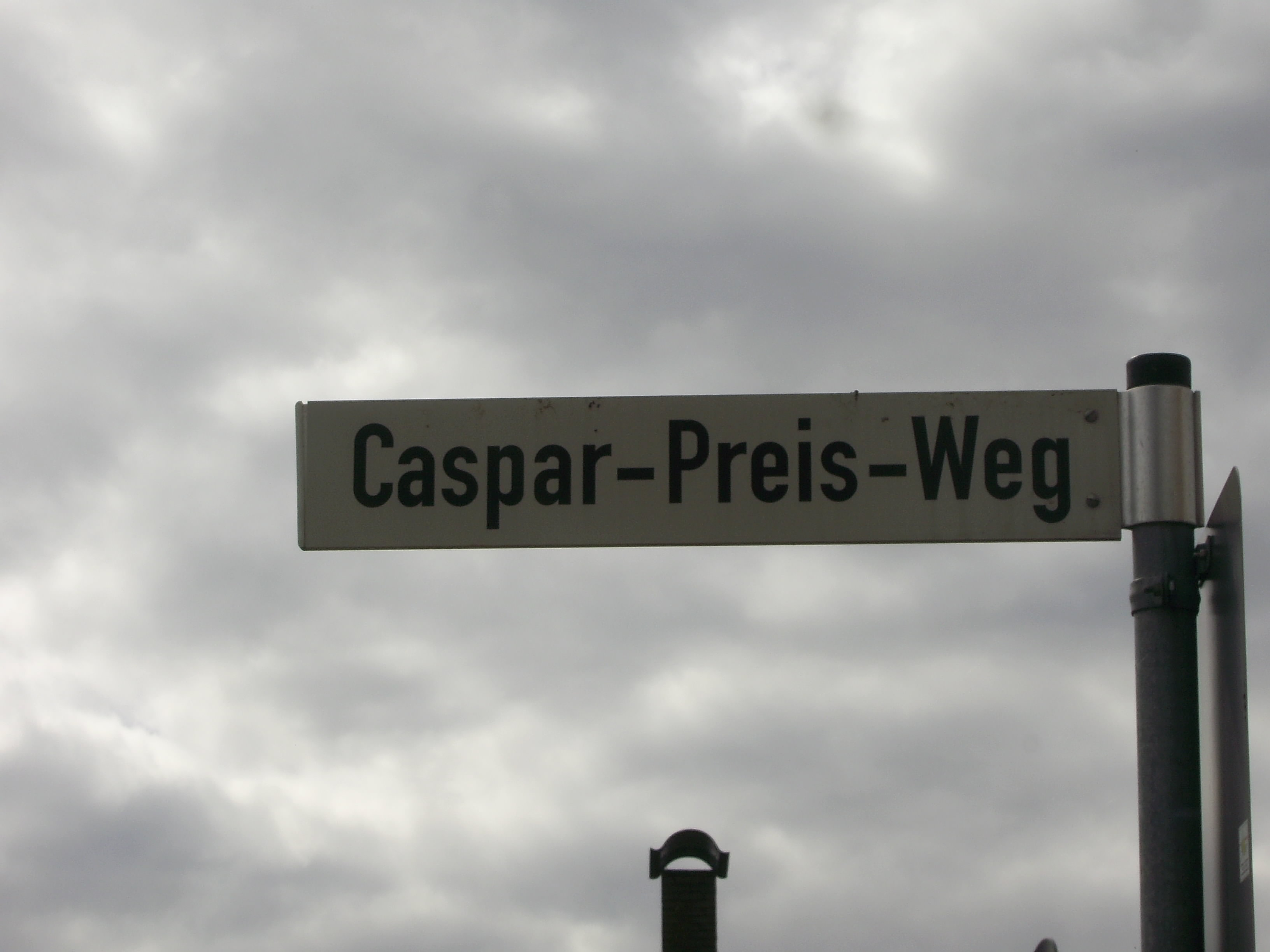 Straßenschild des Caspar-Preis-Weg in Stausebach